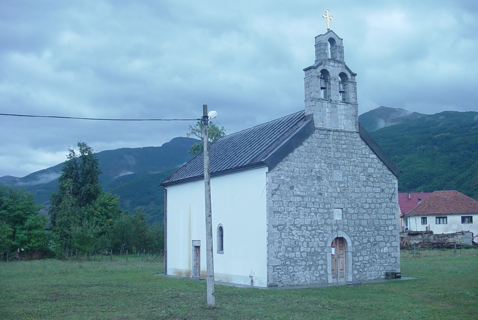 Слика цркве Светог Ђорђа у Гусињу. Слику направио Ogixxl 14. септембра 2008.